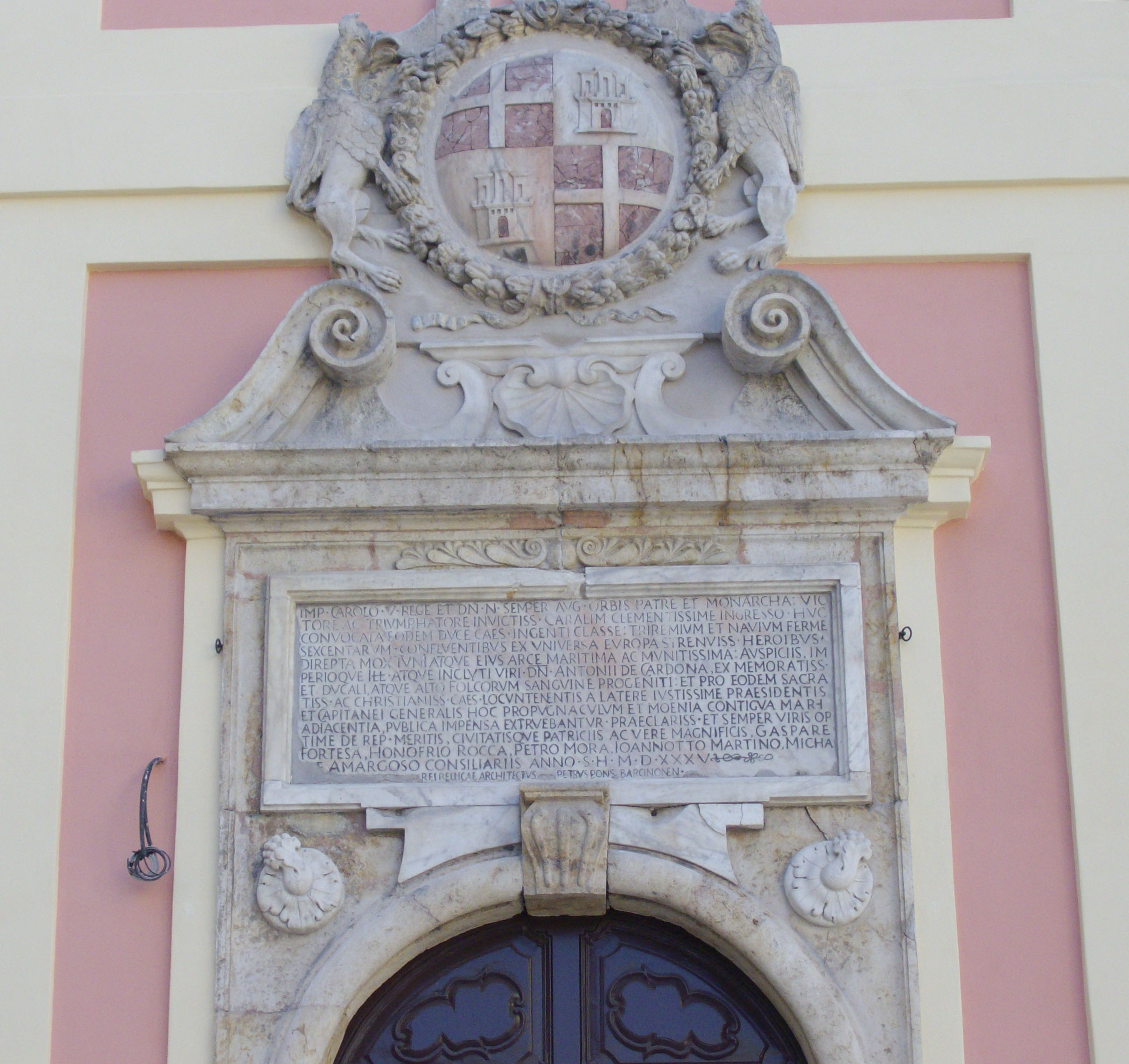 Stemma cittadino e iscrizione (XVI secolo), sulla facciata dell'ex palazzo civico di Cagliari